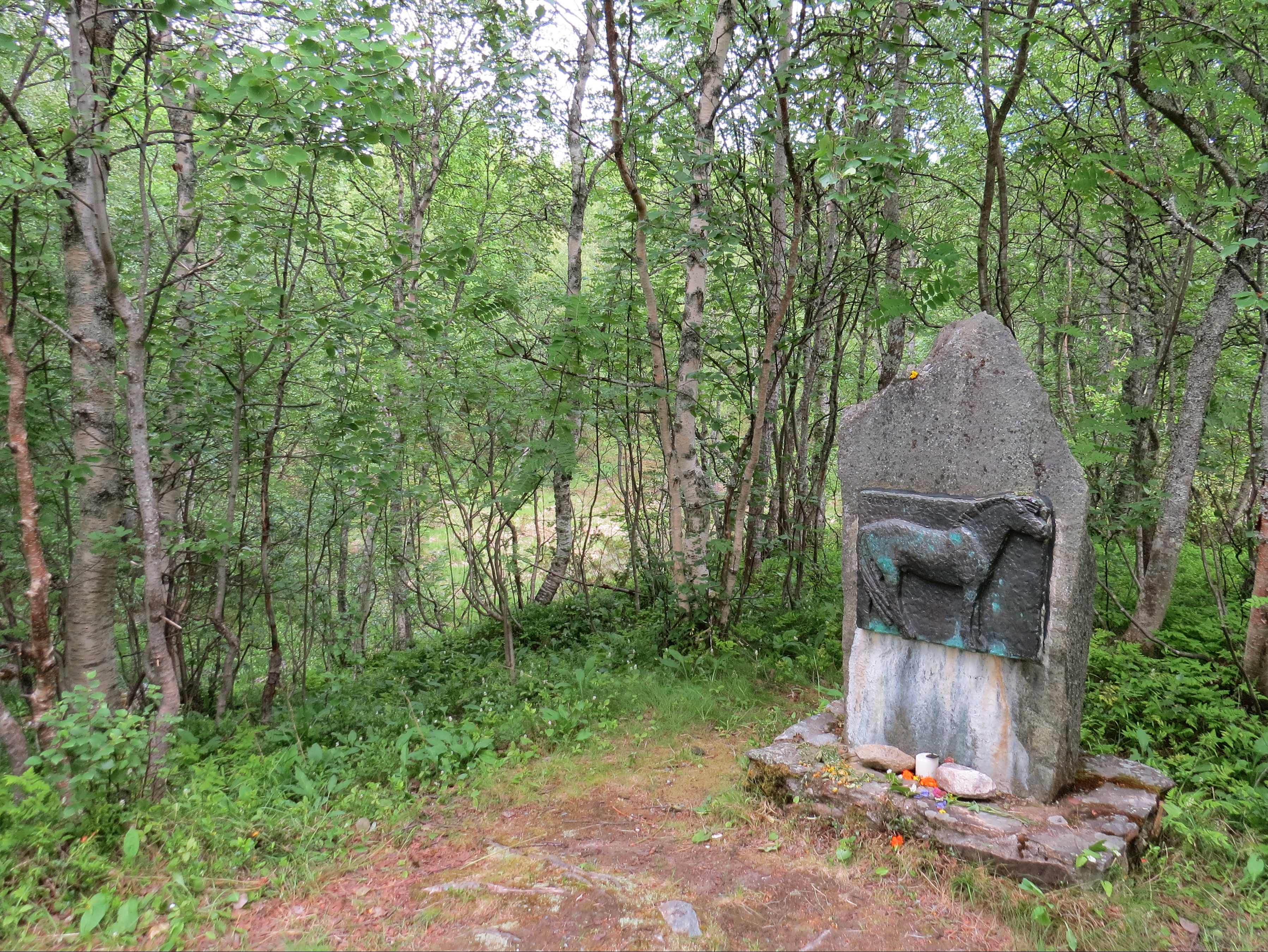 Mindesmærke over Førnesbronen ved Rauland Kirke, Telemark